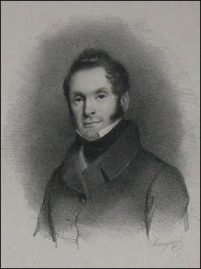 Ferdinand Cornet de Grez d'Elzius (1797-1869)